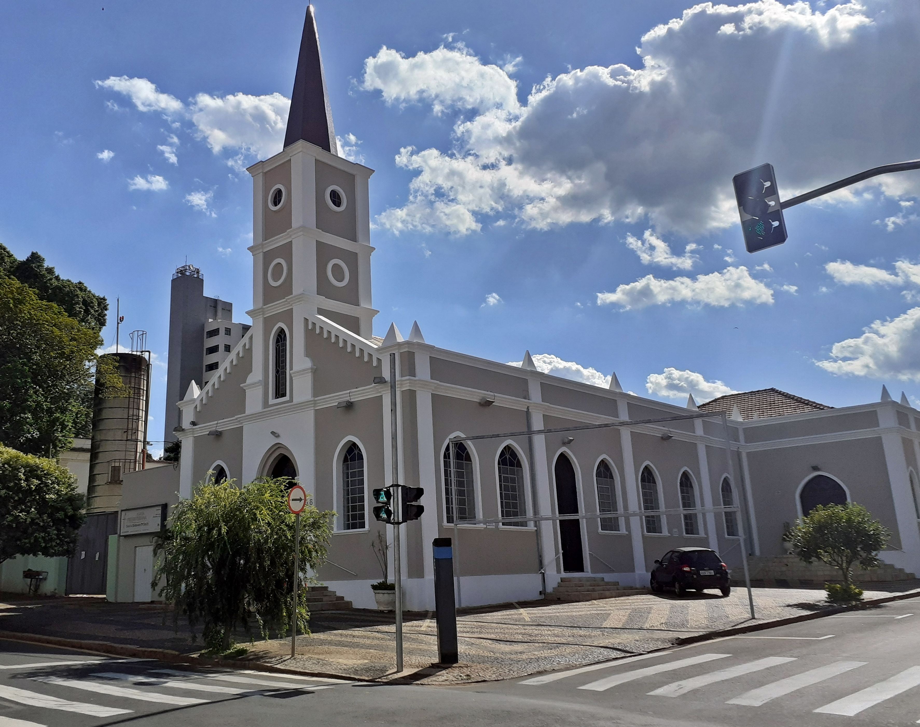 Igreja Presbiteriana de Santa Bárbara d'Oeste